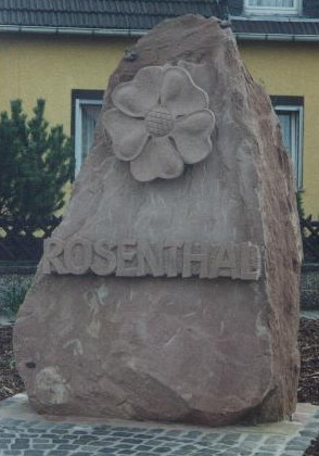 Kloster Rosenthal, Gemeinde Kerzenheim, Rosenthalstein mit Ebersteiner Rosenwappen = Ortswappen.